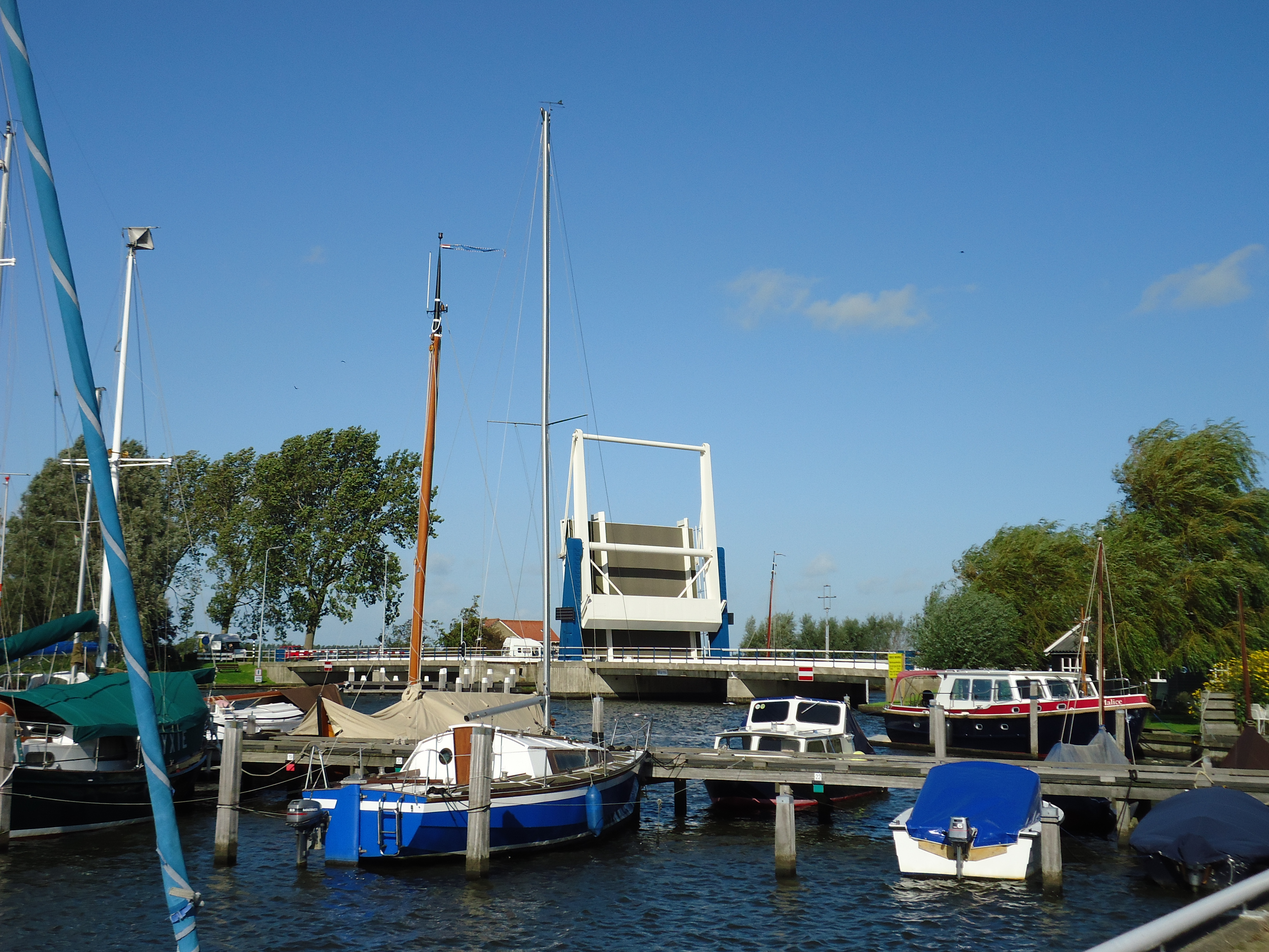 Warns haven